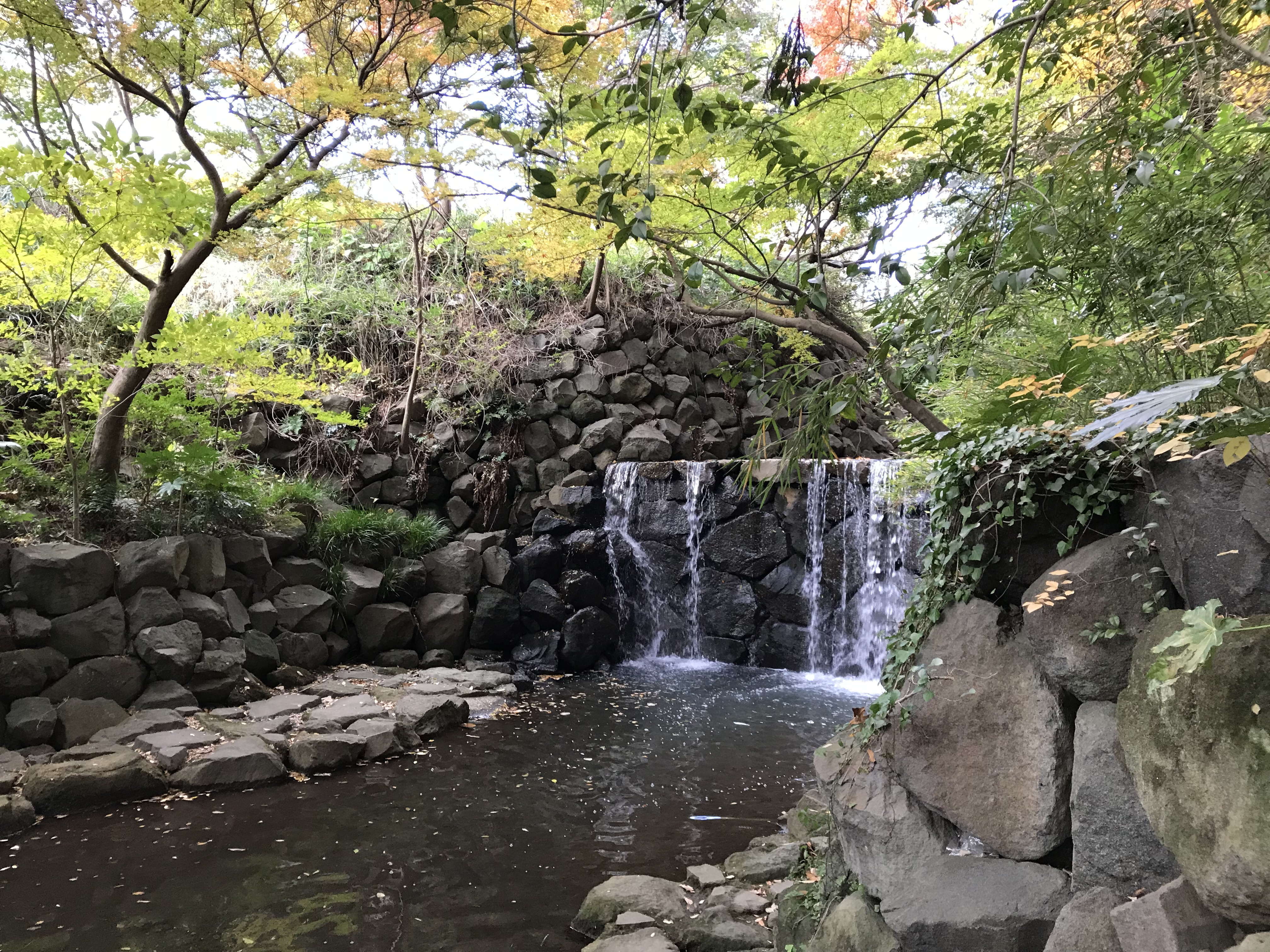 白根神社（横浜市旭区）境内の滝「白糸の滝」